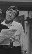 Héctor Rivera- actor